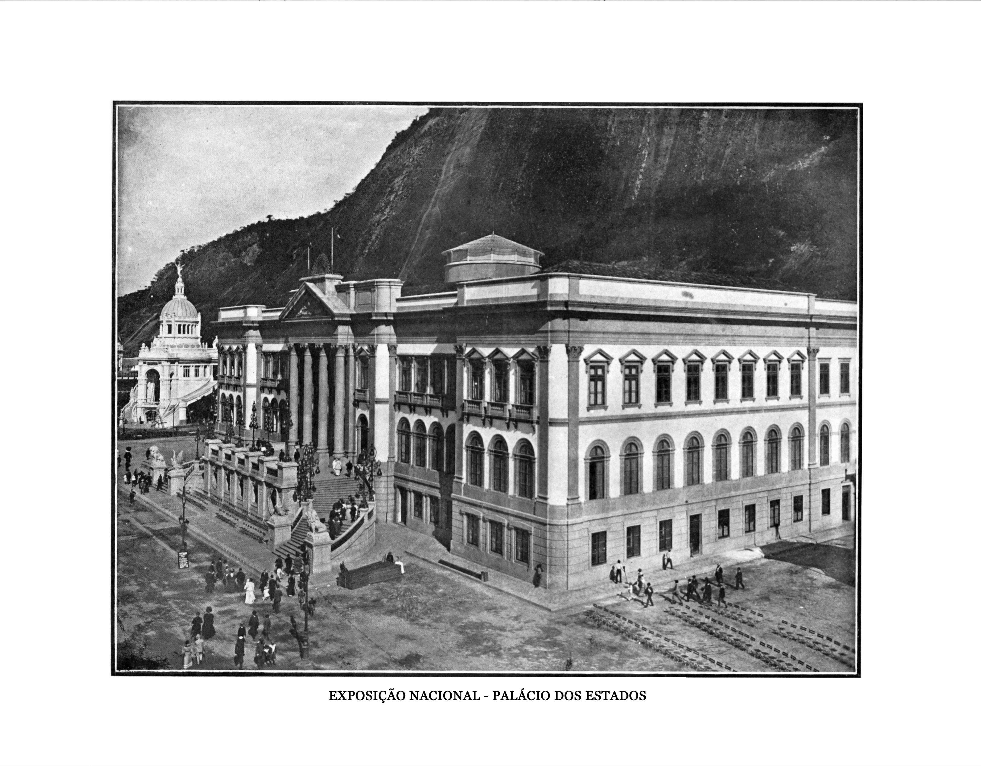 O prédio da Avenida Pasteur, 404, Urca, Rio de Janeiro foi construído para abrigar o Palácio dos Estados na Exposição Nacional de 1908.